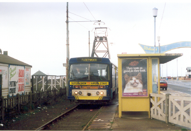 Starr Gate.